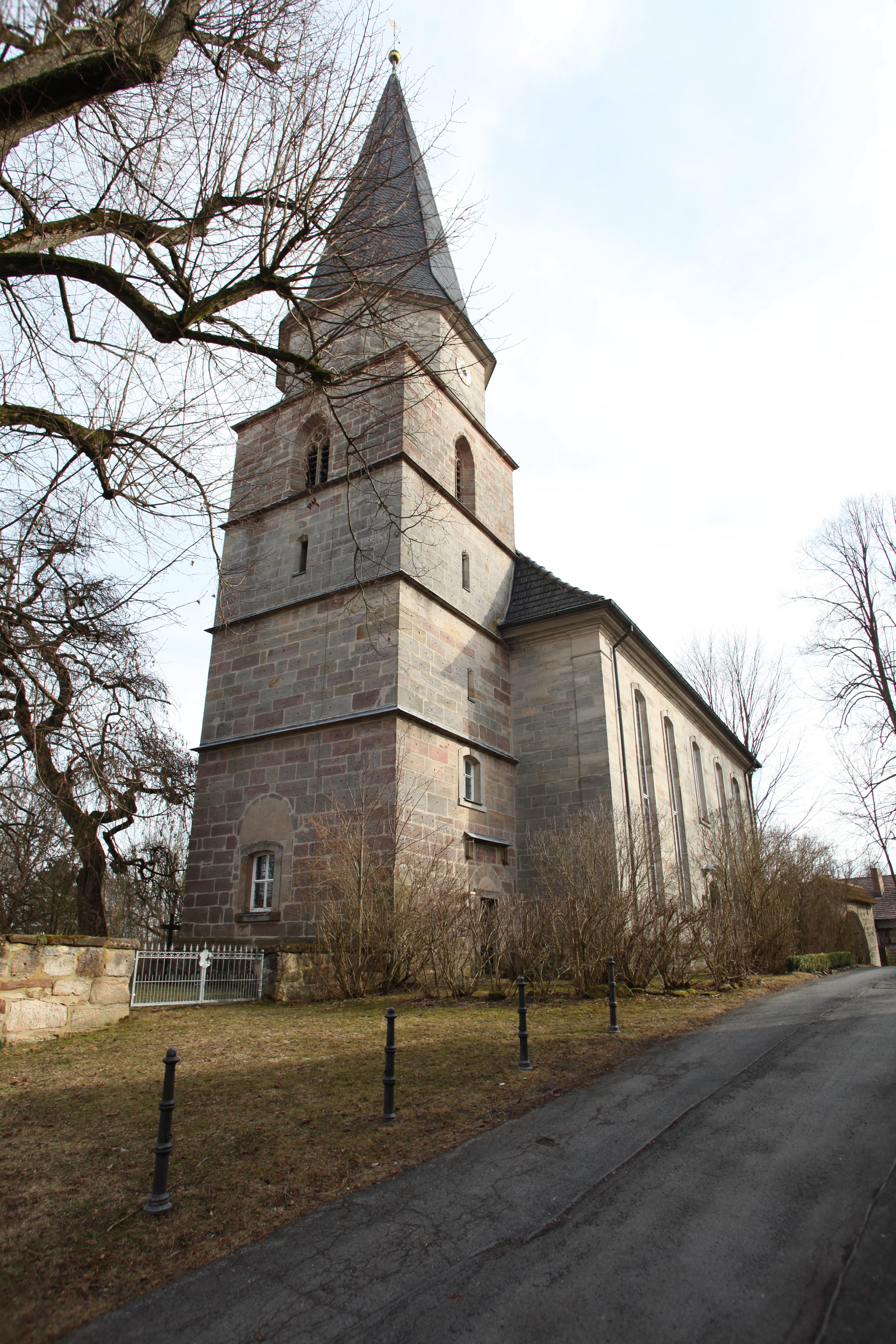 Evangelisch-Lutherische Dreifaltigkeitskirche in Weißenbrunn vorm Wald, Landkreis Coburg